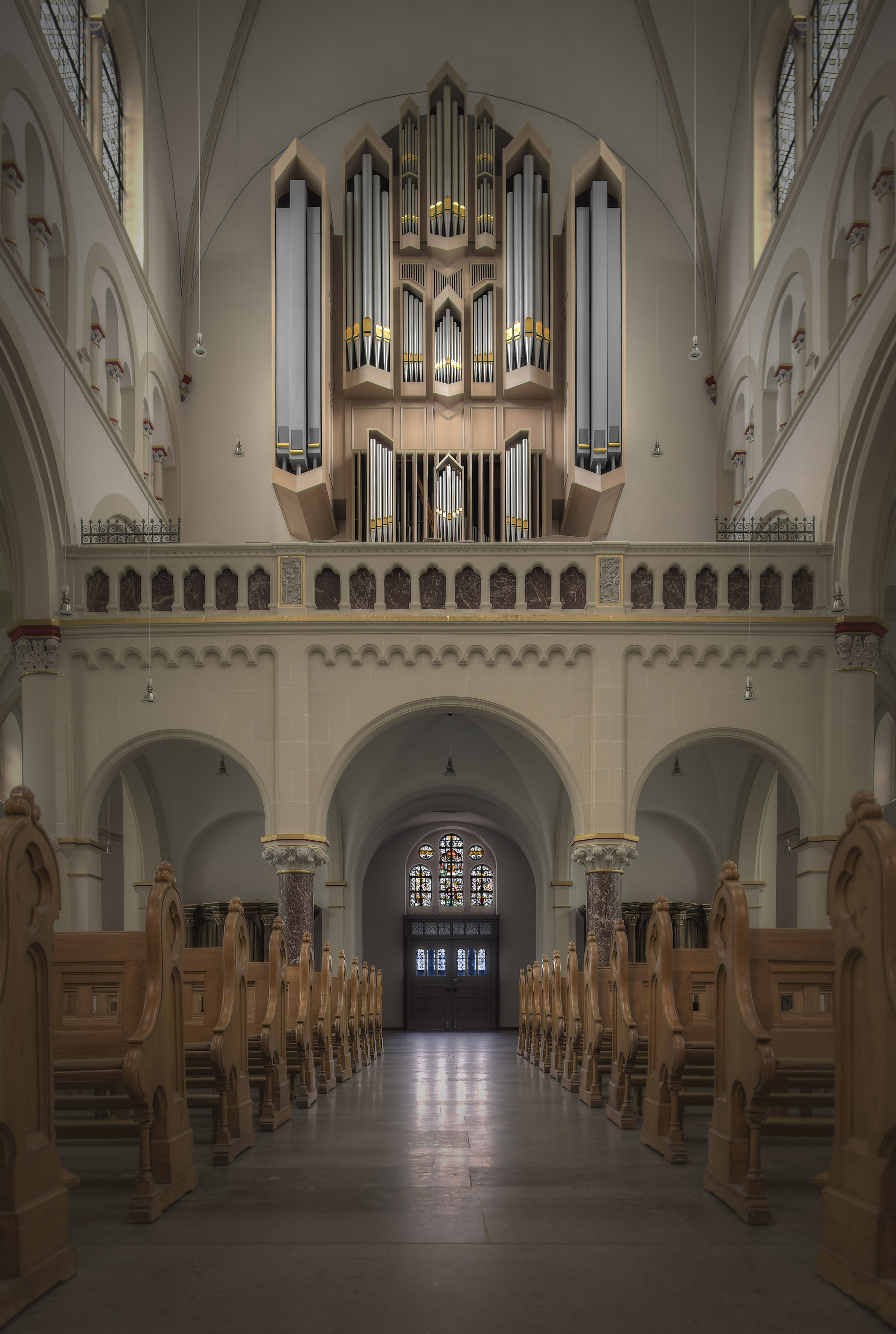 Feith Orgel in St. Johannes Neheim